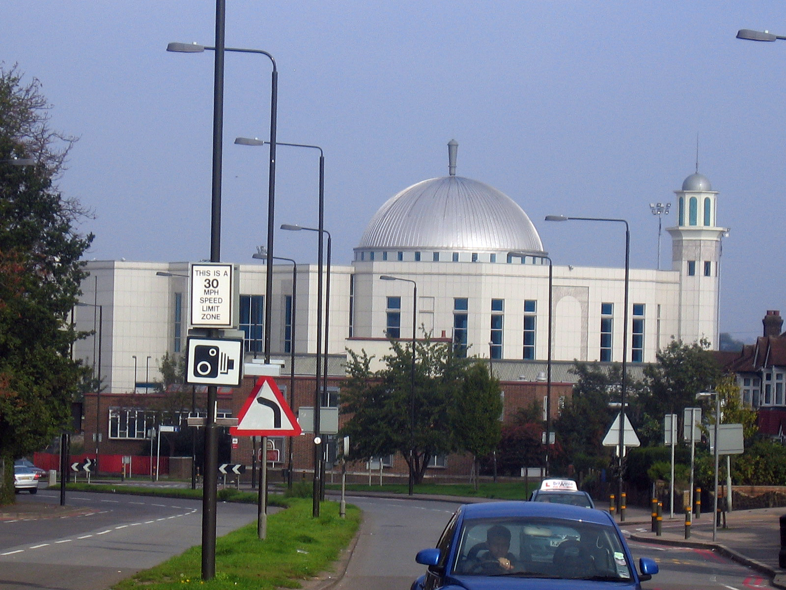 The Baitul Futuh Mosque in London